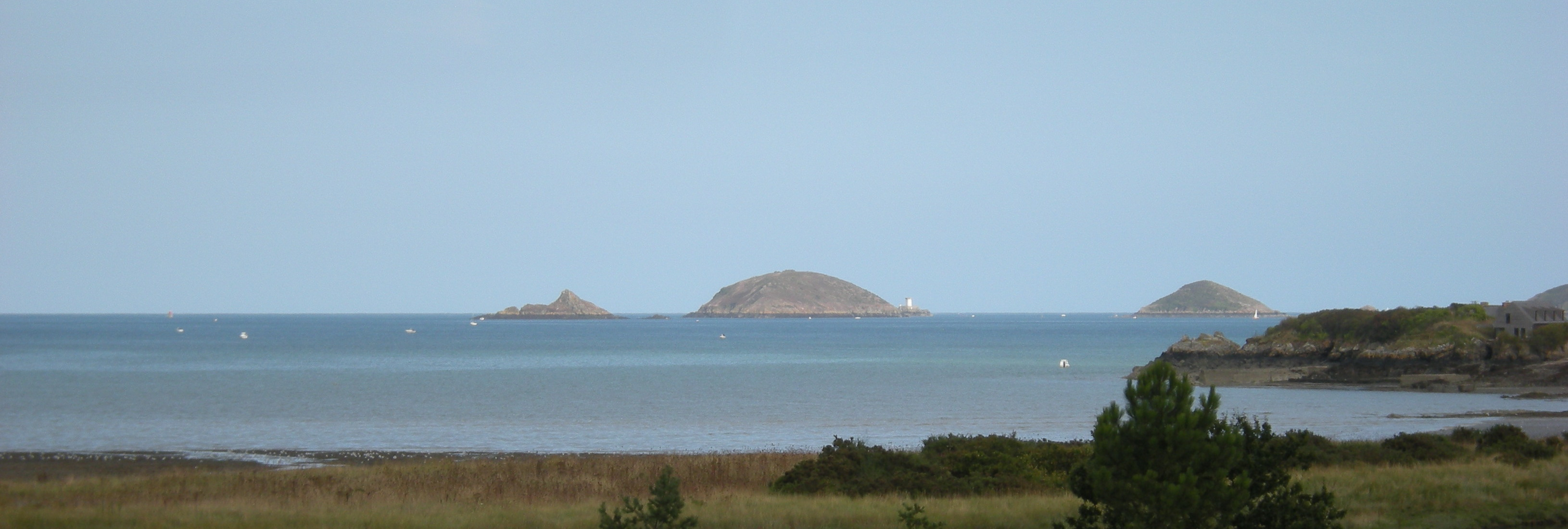 Mez de Goëlo vus depuis l'Abbaye de Beauport